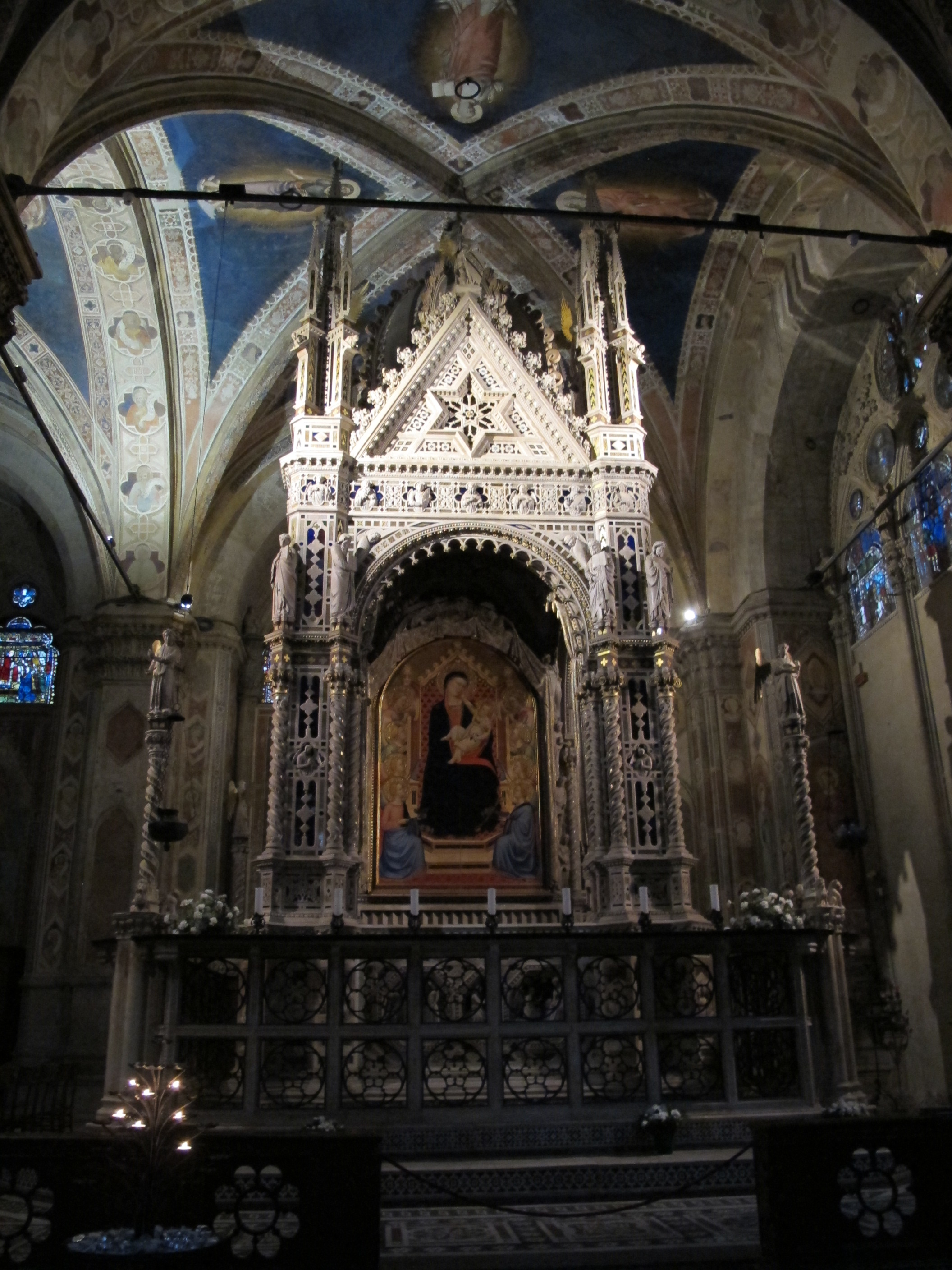 Tabernacolo dell'orcagna